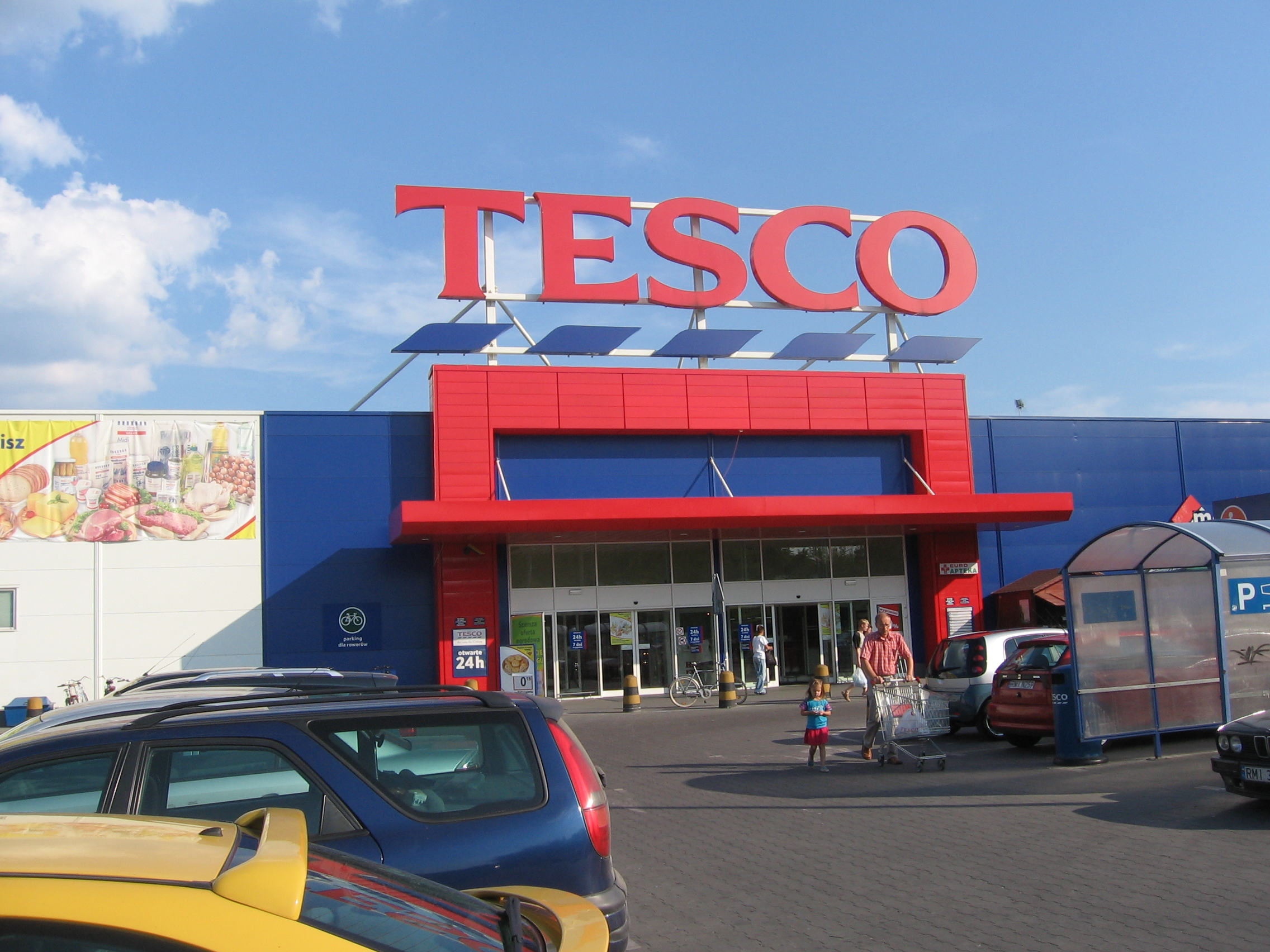 Tesco w Mielcu.